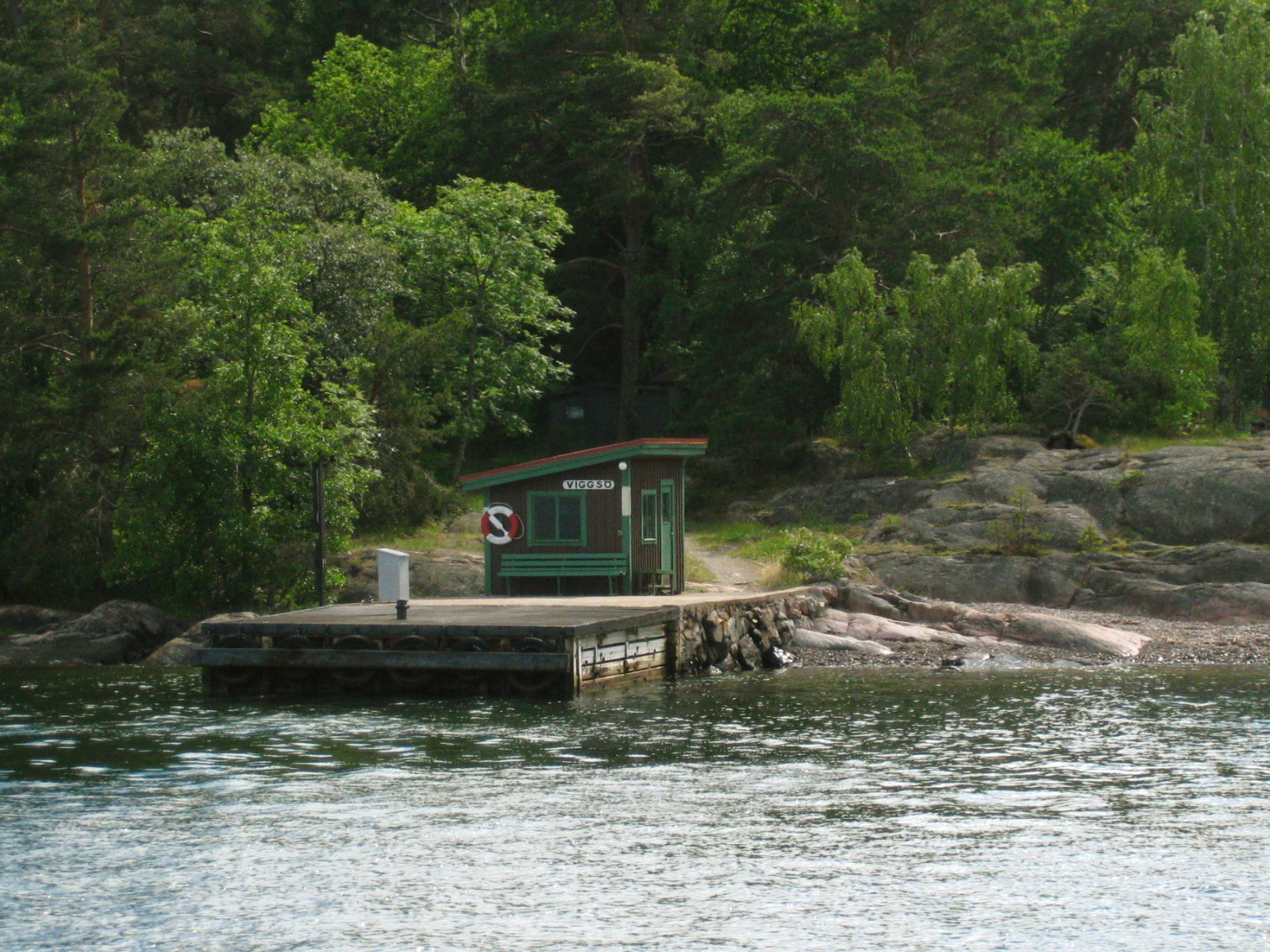 Viggsö brygga